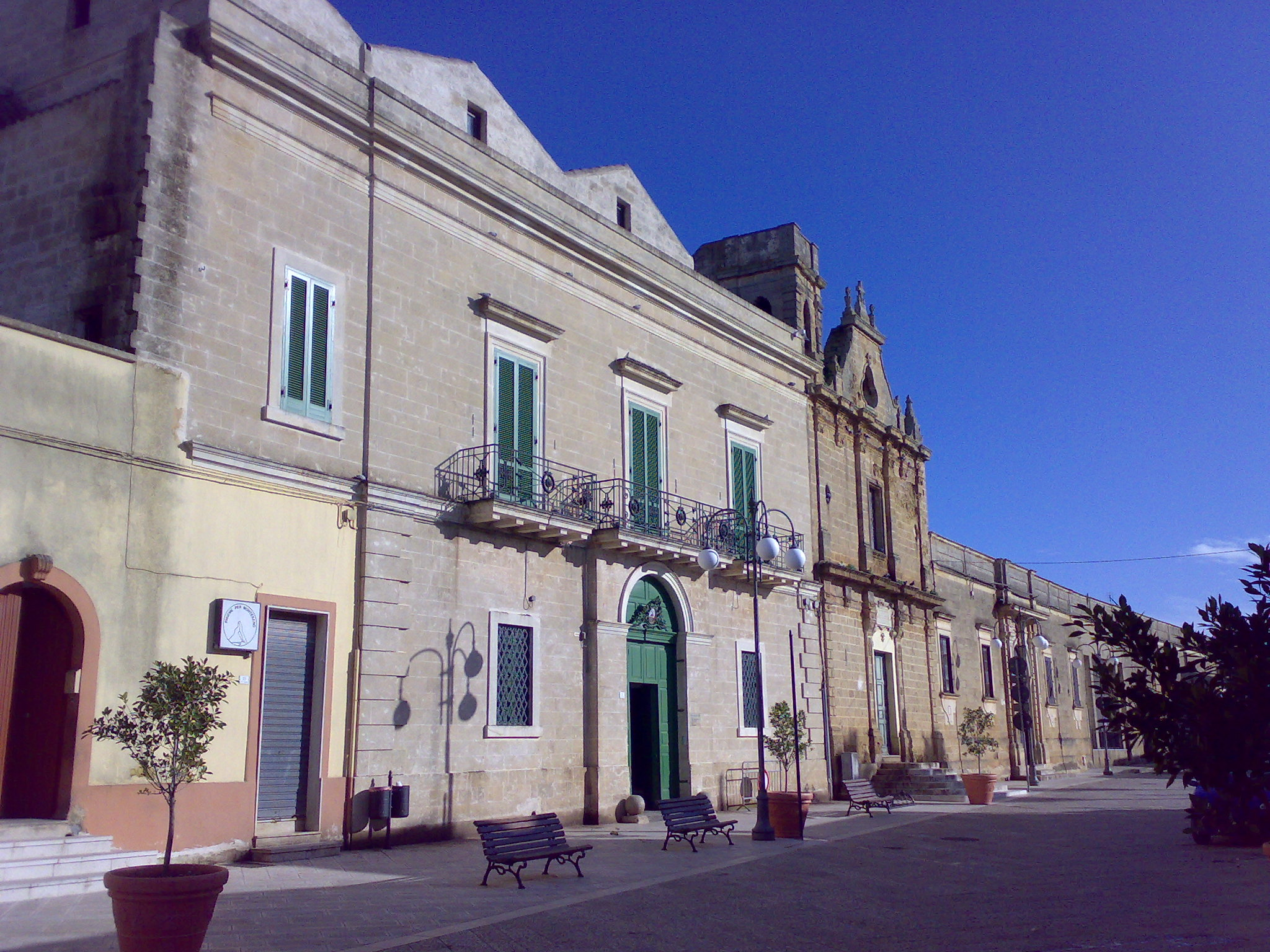 Palazzo Bitonti e chiesa di San Giuseppe Montesano Salentino